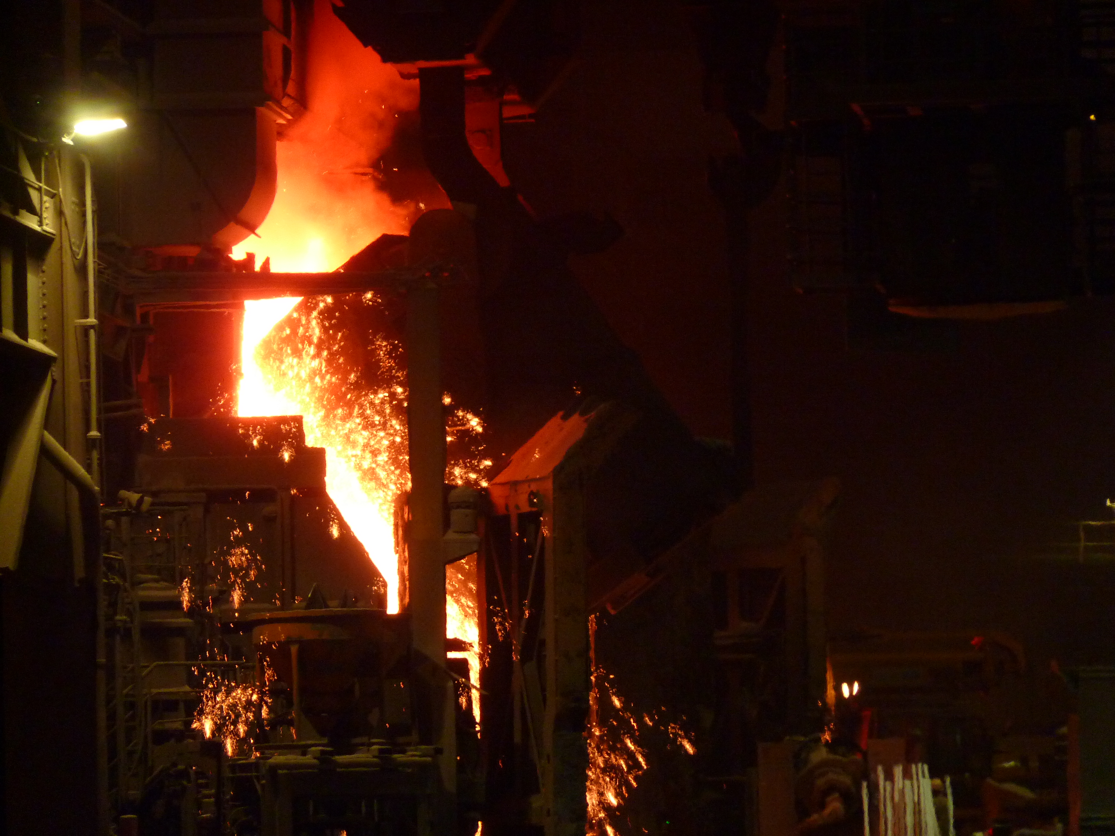 Befüllen eines LD-Konverters der HKM in Duisburg-Huckingen